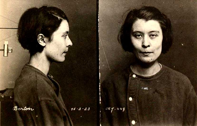 Germaine Berton (Germaine, Jeanne, Yvonne), née le 7 juin 1902 à Puteaux (Seine) et morte suicidée le 5 juillet 1942 (à 40 ans) à Paris, est une ouvrière métallurgiste, militante syndicaliste et anarchiste française.